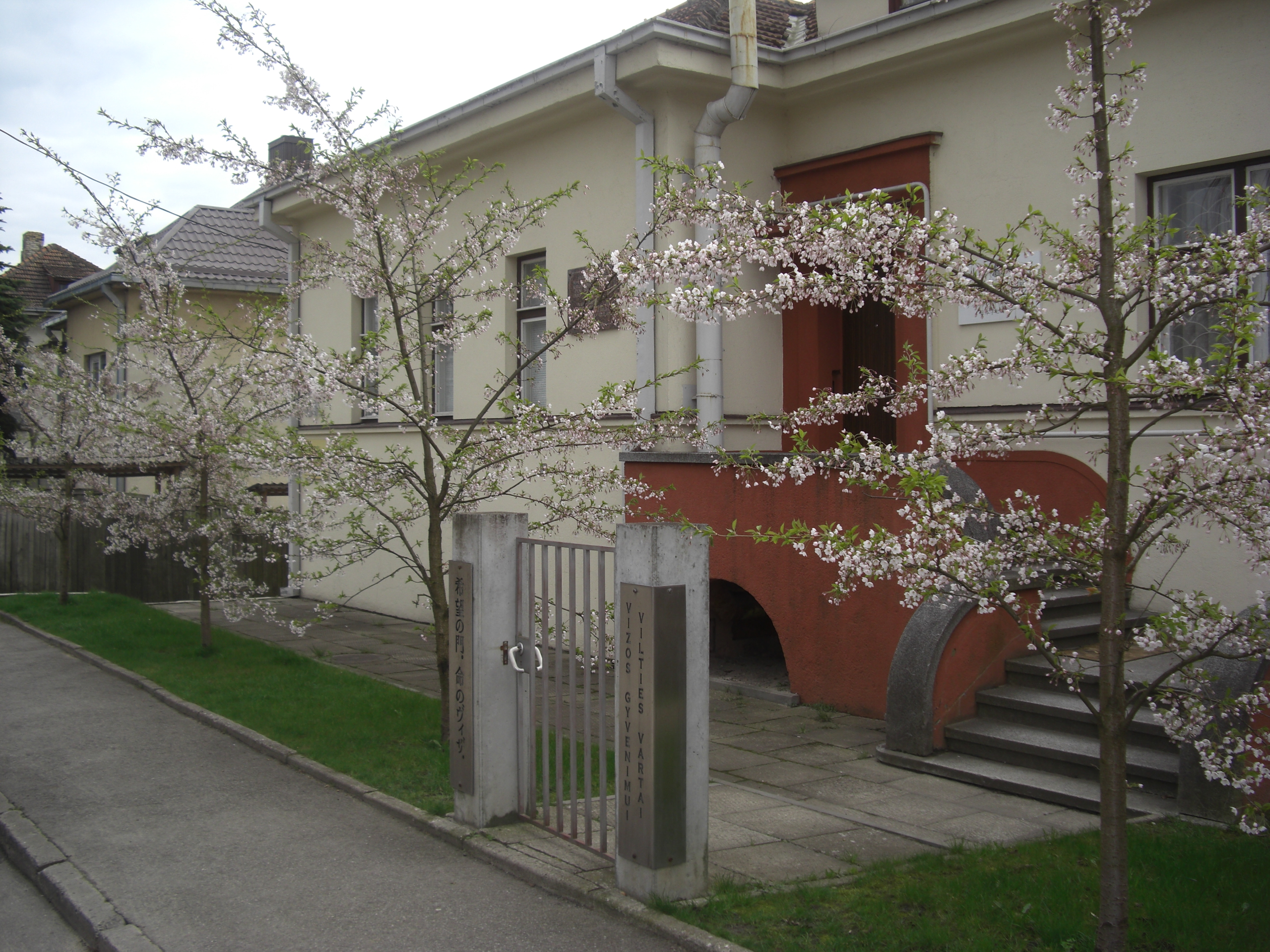 Azijos studijų centras, Kaunas.